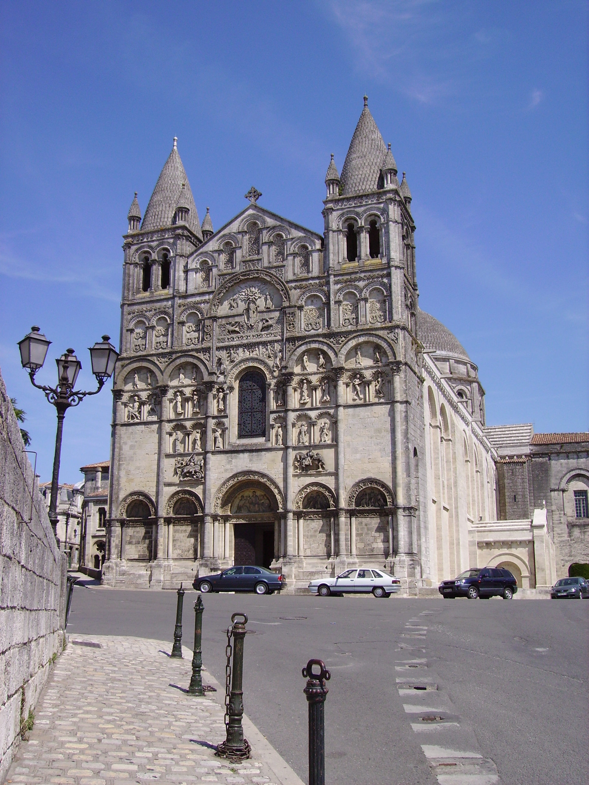 Cathédrale Saint Pierre Angoulême (16000), France Juin 2006